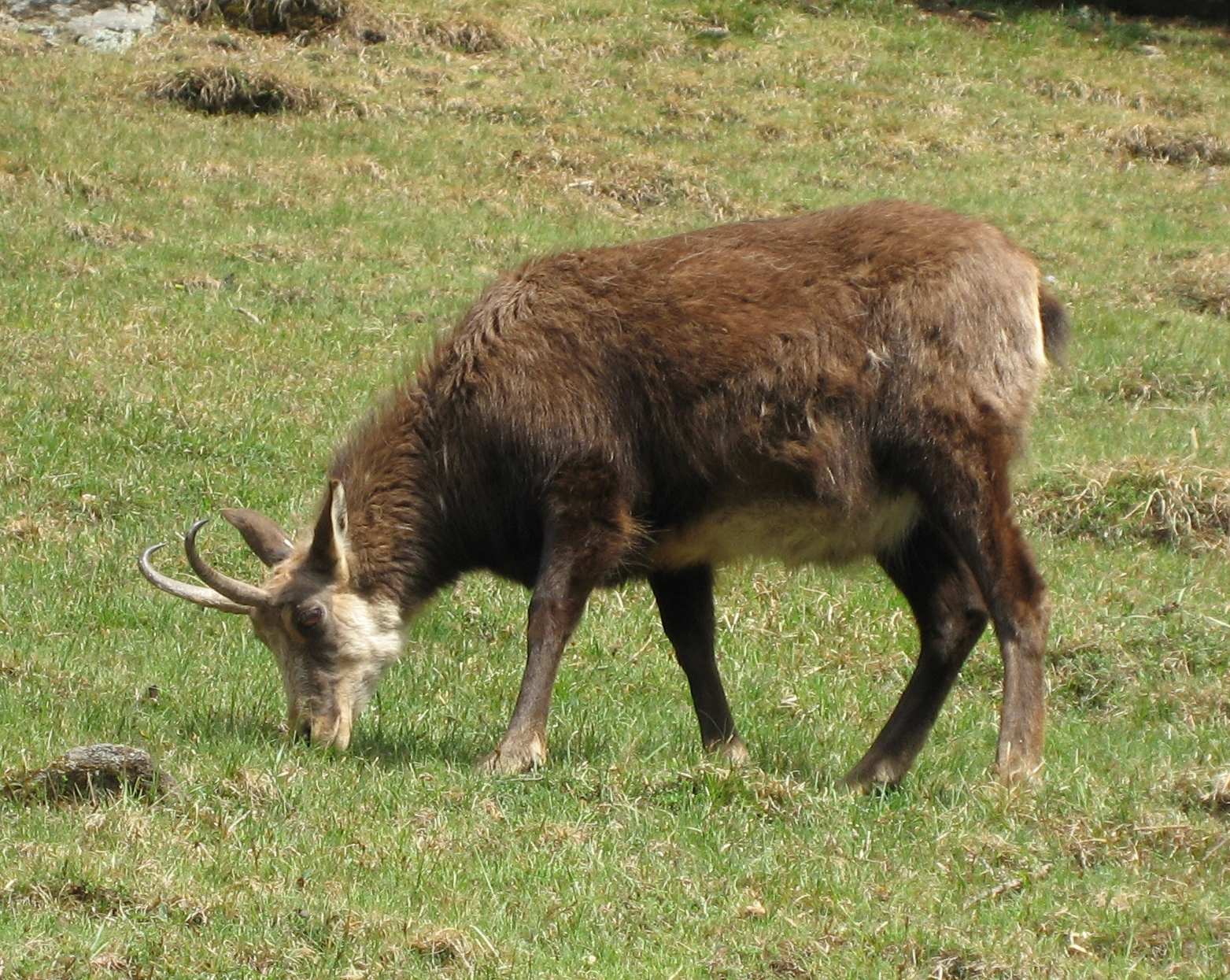 Rupicapra rupicapra in Parc de Merlet (Chamois) Map: 45° 54' 26" N 6° 49' 2" E